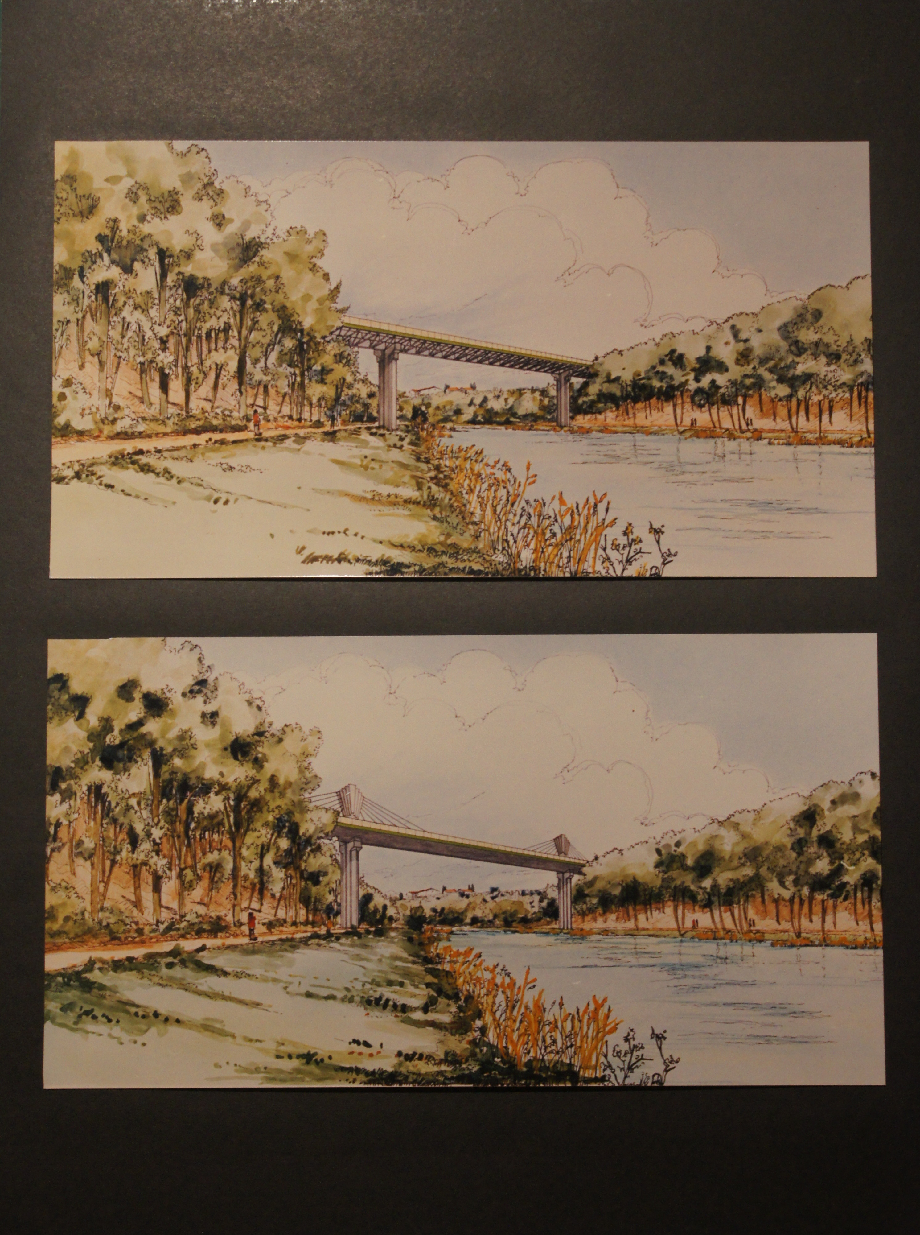 Dessin